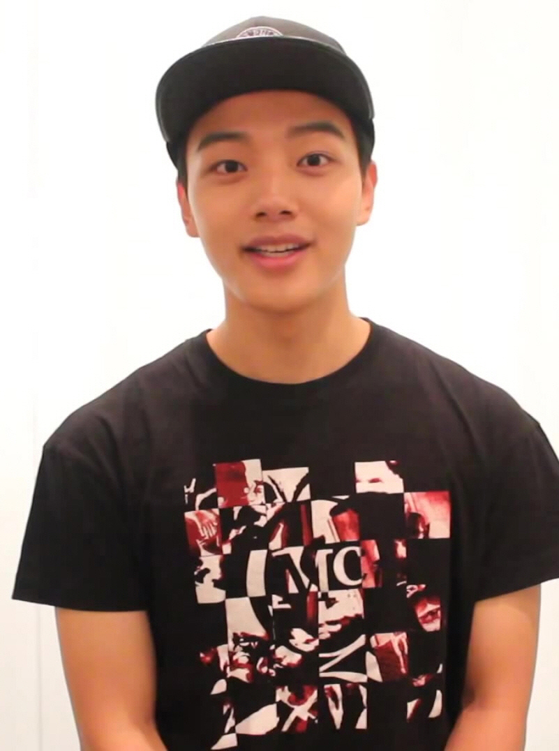 나의 독재자 여진구 응원 영상